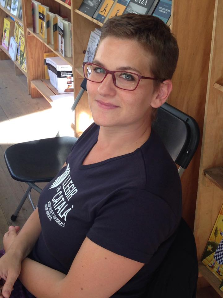 Laura Huerga, editora de Raig Verd